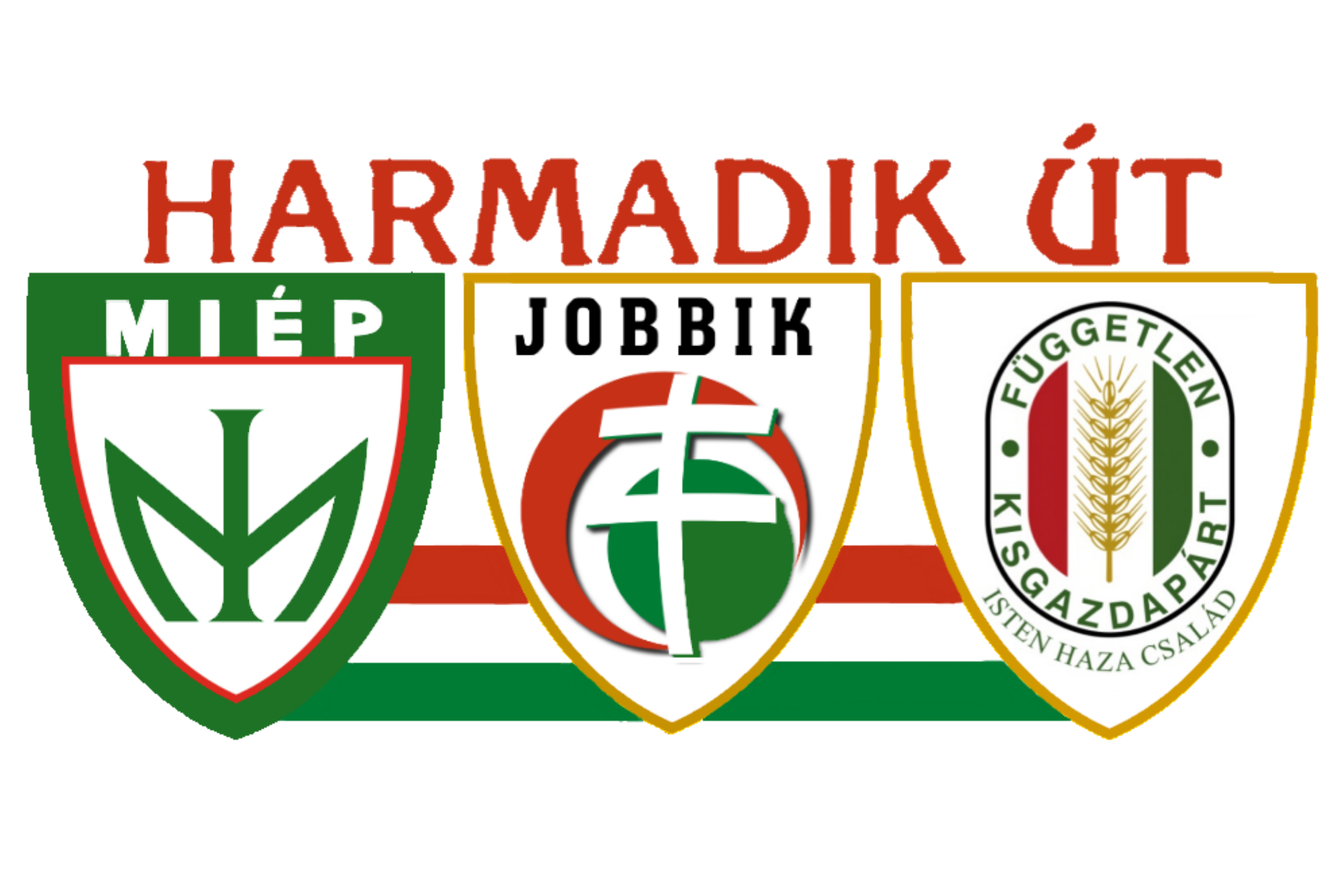 A MIÉP - Jobbik a Harmadik út logója a Független Kisgazdapárt szervezetekkel együtt